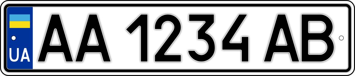 Знак 1.1